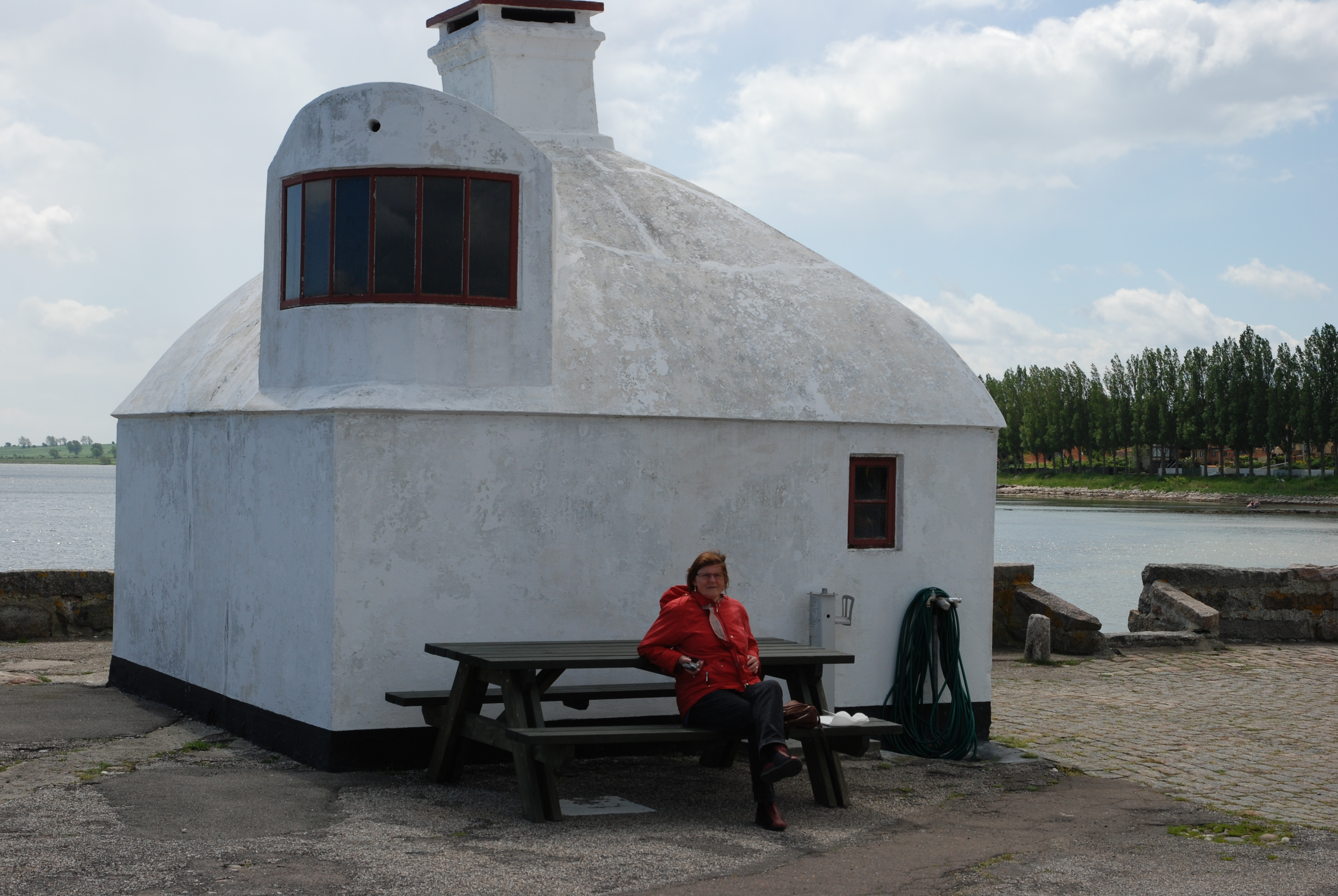 Beghus på Ærøskøbing Havn i Danmark.